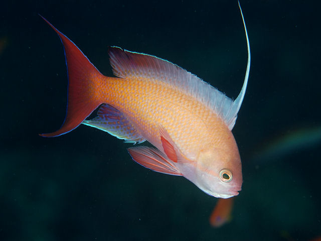 キンギョハナダイ♂ Pseudanthias squamipinnis